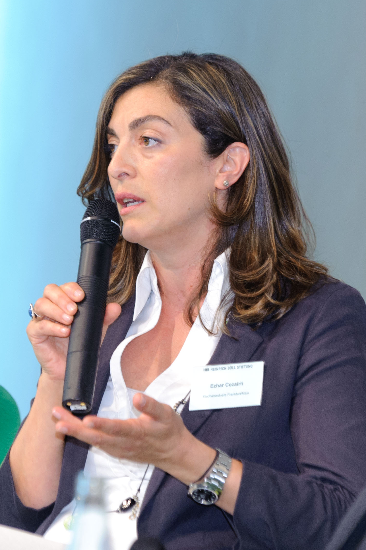 Ezhar Cezairli (Stadtverordnete Frankfurt/Main, CDU) Foto: Stephan Röhl